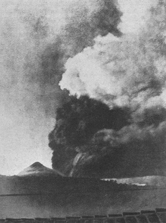 Der Vulkan Santa María in Guatemala während des Ausbruchs im Jahr 1902.